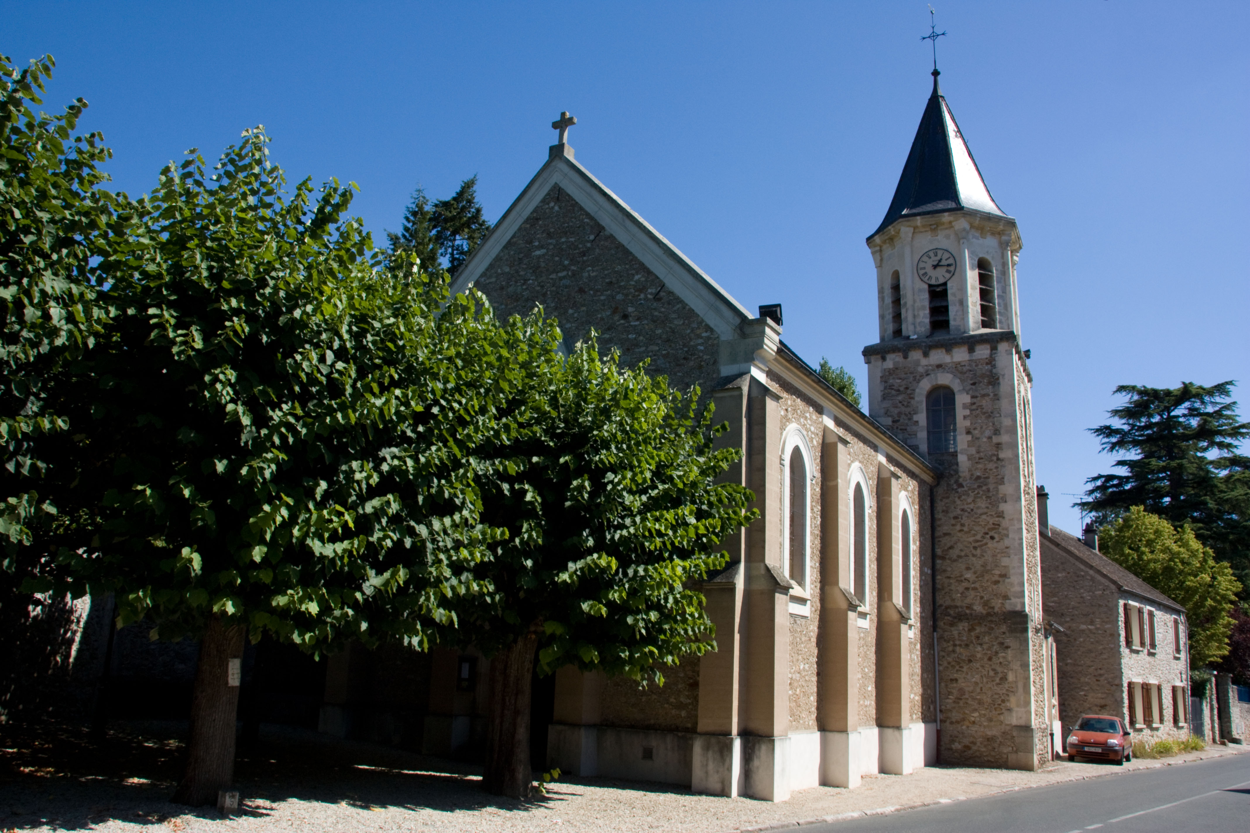 Eglise de Morsang-sur-Seine, Morsang-sur-Seine, Essonne, France